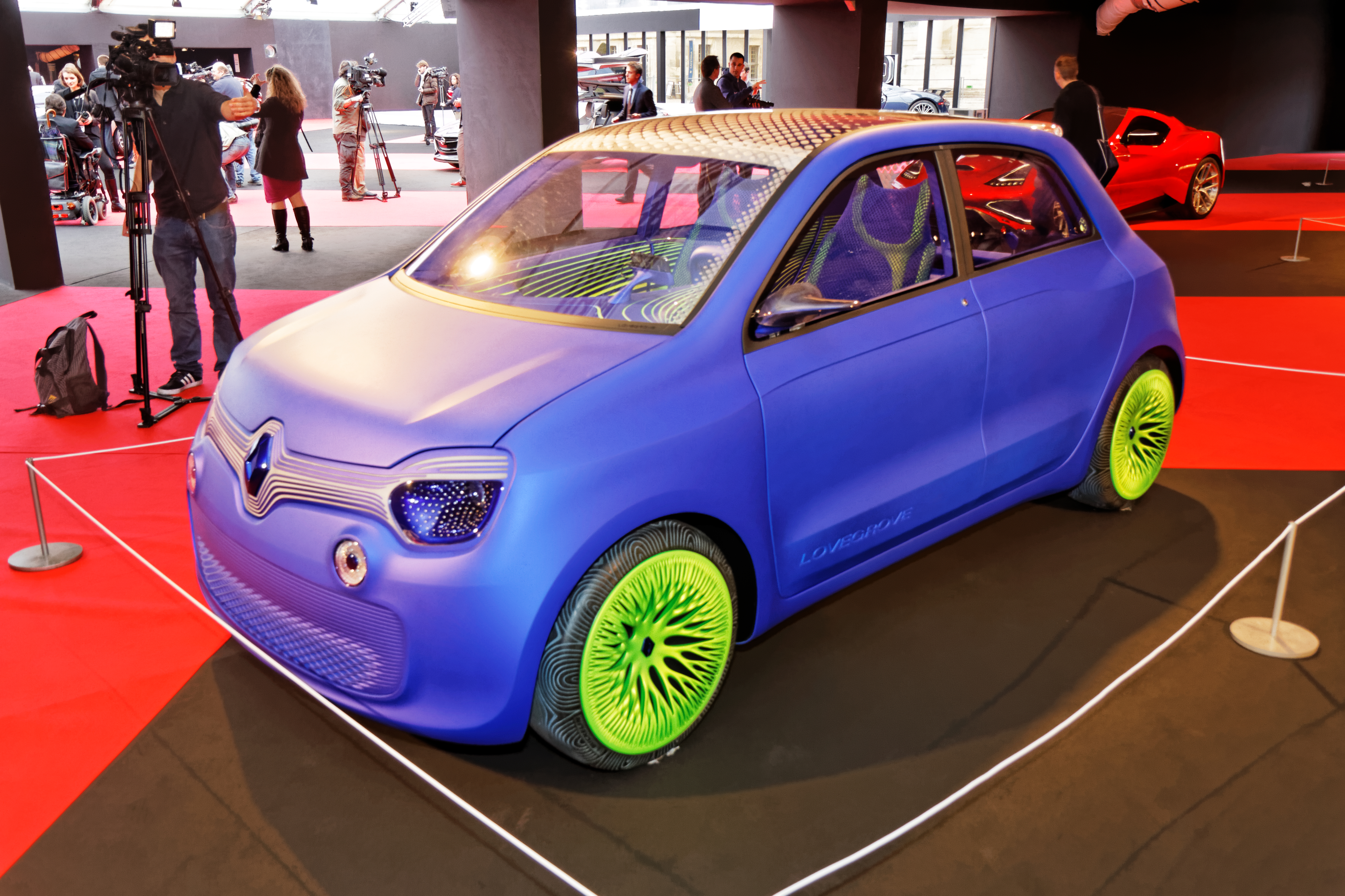 La Renault Twin'Z exposée lors du festival automobile international 2014.